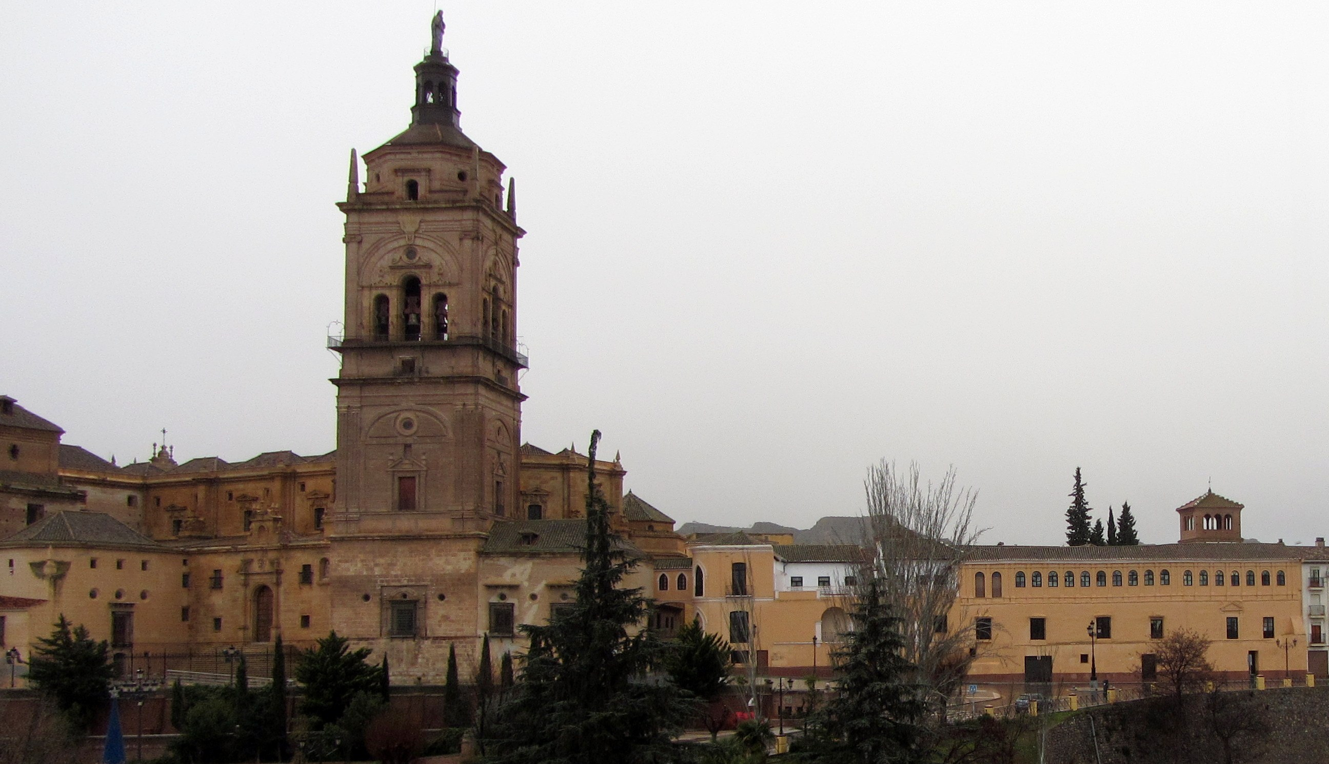 Imagen de la Catedral de Guadix (España y del Palacio Episcopal, sede también de la Curia, el Archivo Histórico Diocesano y el Centro de Estudios "Pedro Suárez".